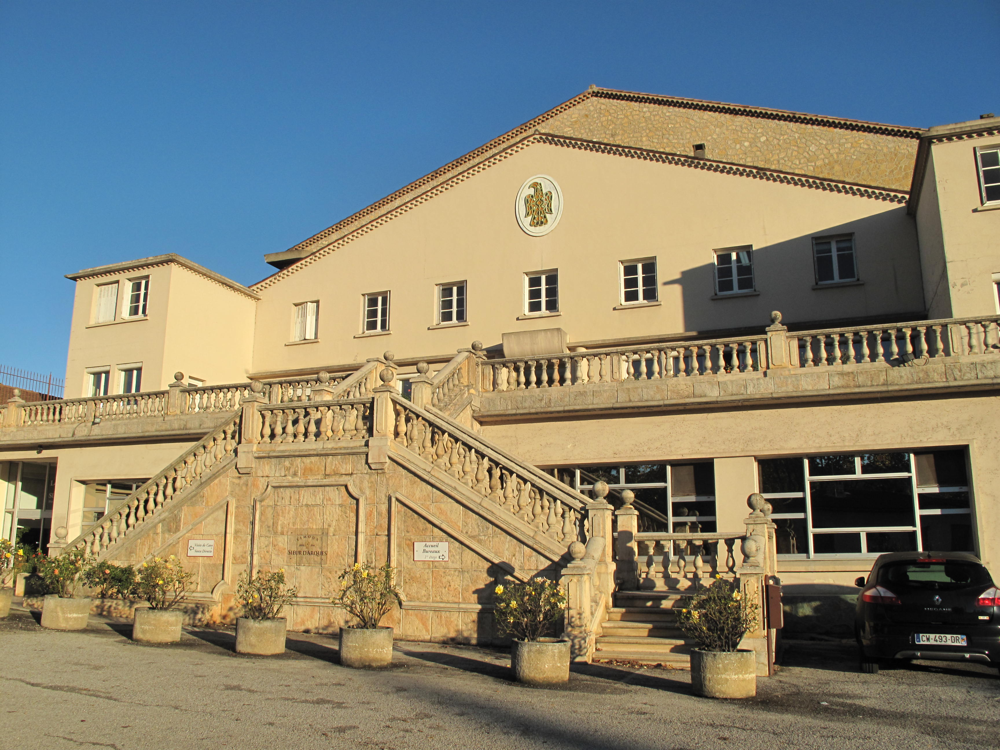 Sieur d'Arques est une cave coopérative à Limoux